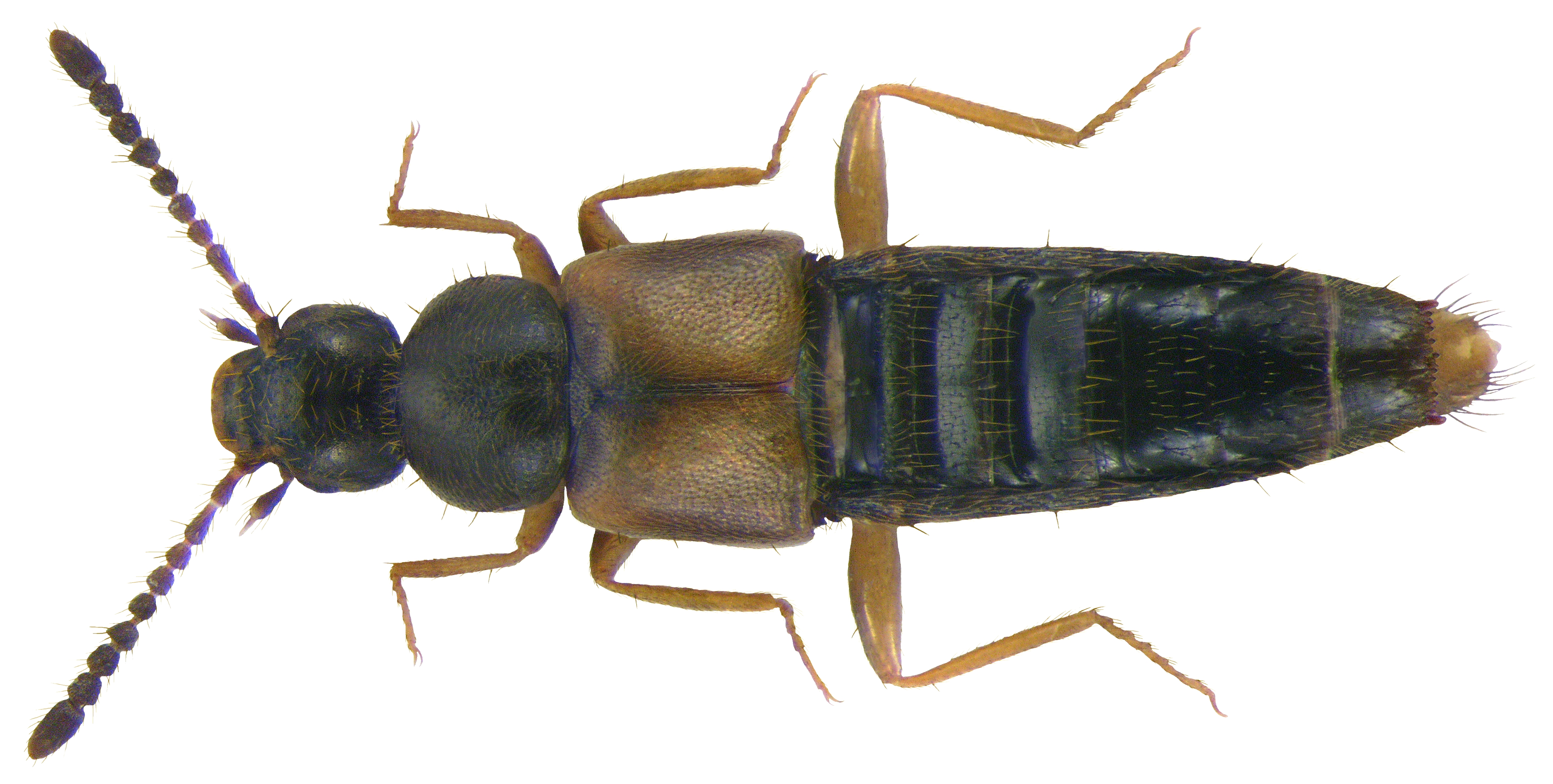 Familie: Staphylinidae Grösse: 3,5-3,8 mm Verbreitung: Europa Ökologie: besonders an Pilzen Fundort: Germania, Bayern, Oberfranken, Selbitz leg.det. U.Schmidt, 2000 Foto: U.Schmidt, 2009